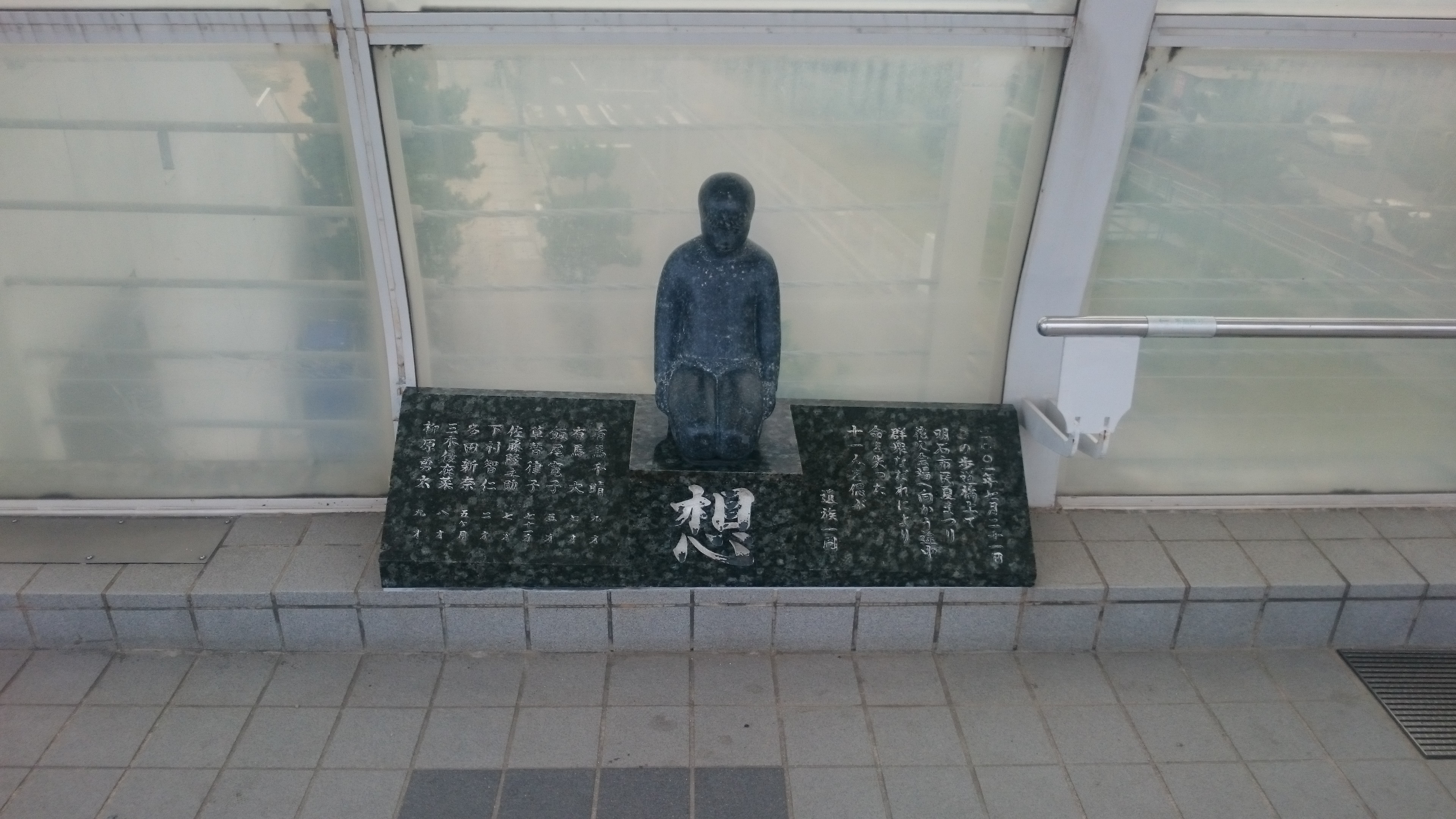 2001(平成13)年7月21日に起きた明石花火大会歩道橋事故の犠牲者を追悼する意思で事故現場に設けられた慰霊碑